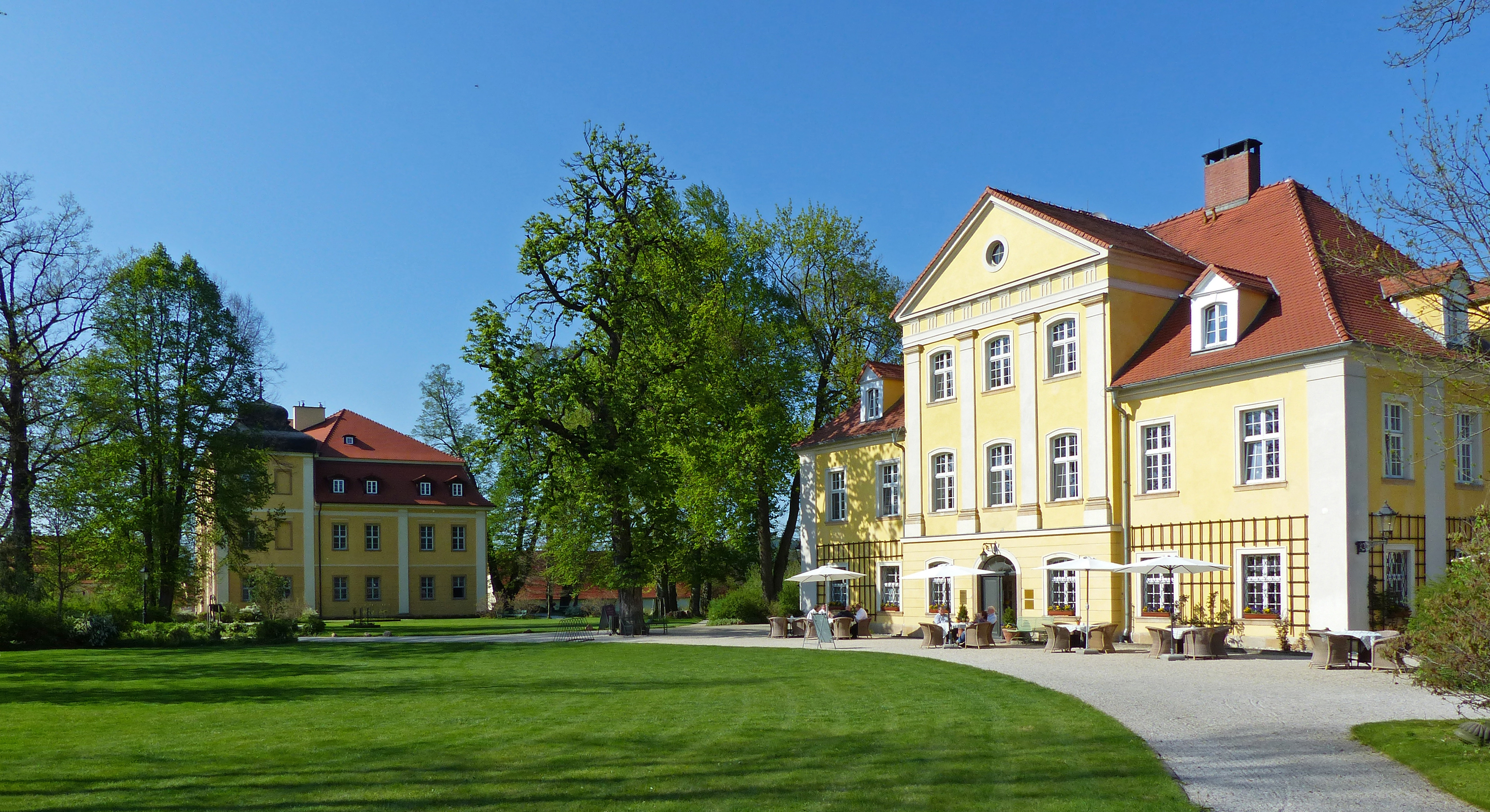 Schloss Lomnitz (Pałac Łomnica), Kleines Schloss, Hotel und Schloss-Restaurant, Lomnica, Niederschlesien